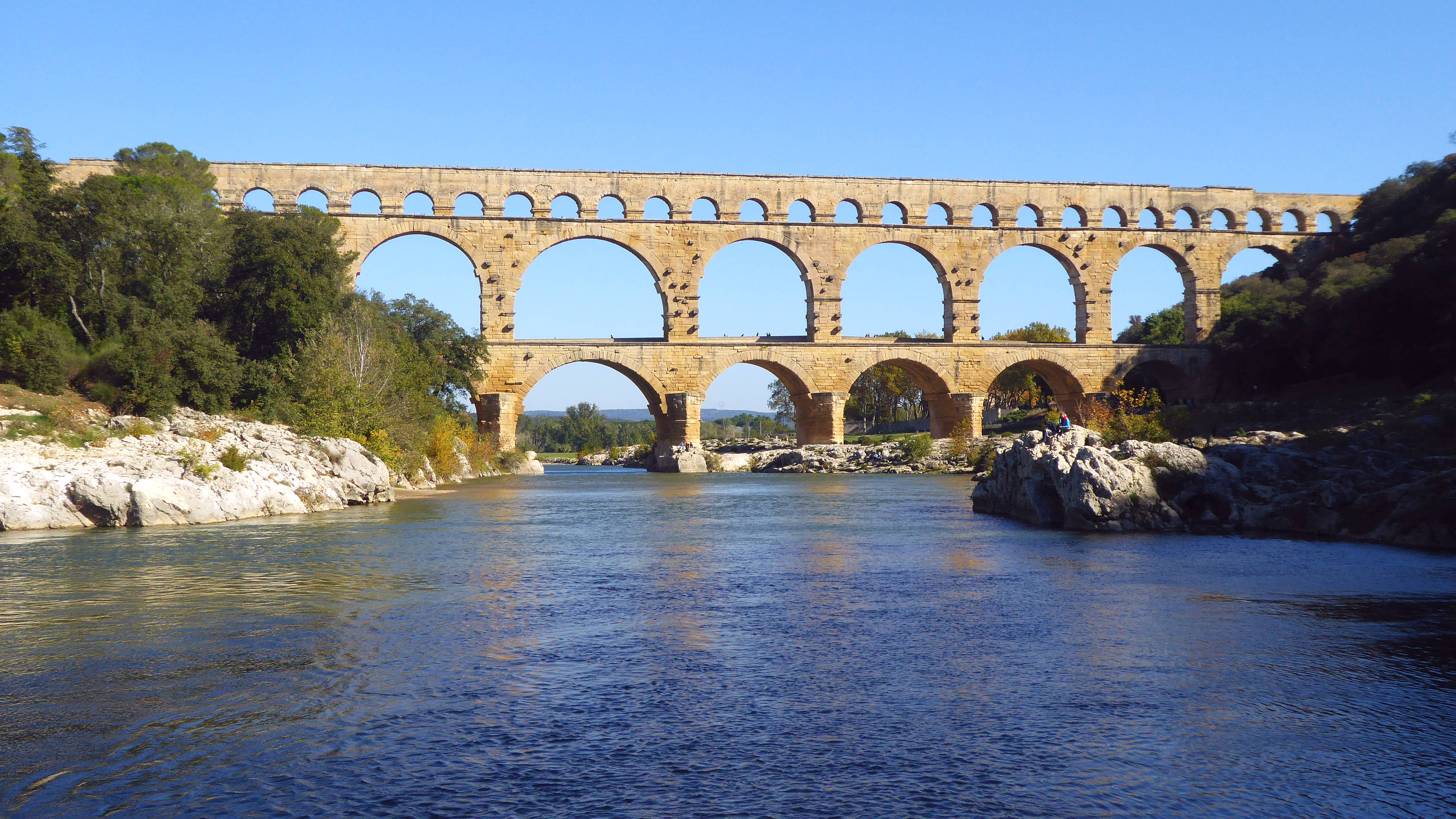 Aquädukt Pont du Gard vom Fluss Gardon aus westlicher Perspektive aus das 275m breite und 49m hohe Aquädukt - Okzitanien Frankreich - Foto Wolfgang Pehlemann P1160469